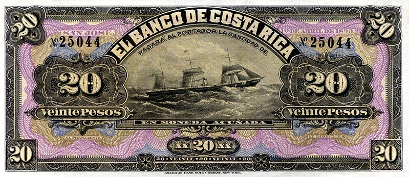 20 костариканских песо. Коста-Рика. Аверс. Пароход.